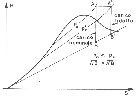 rappresentazione grafica del processo di laminazione nel piano h-s